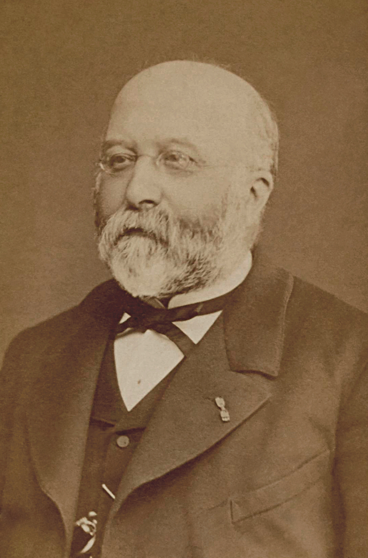 Henry Varroy (1826 - 1883), homme politique français, député, sénateur, ministre.